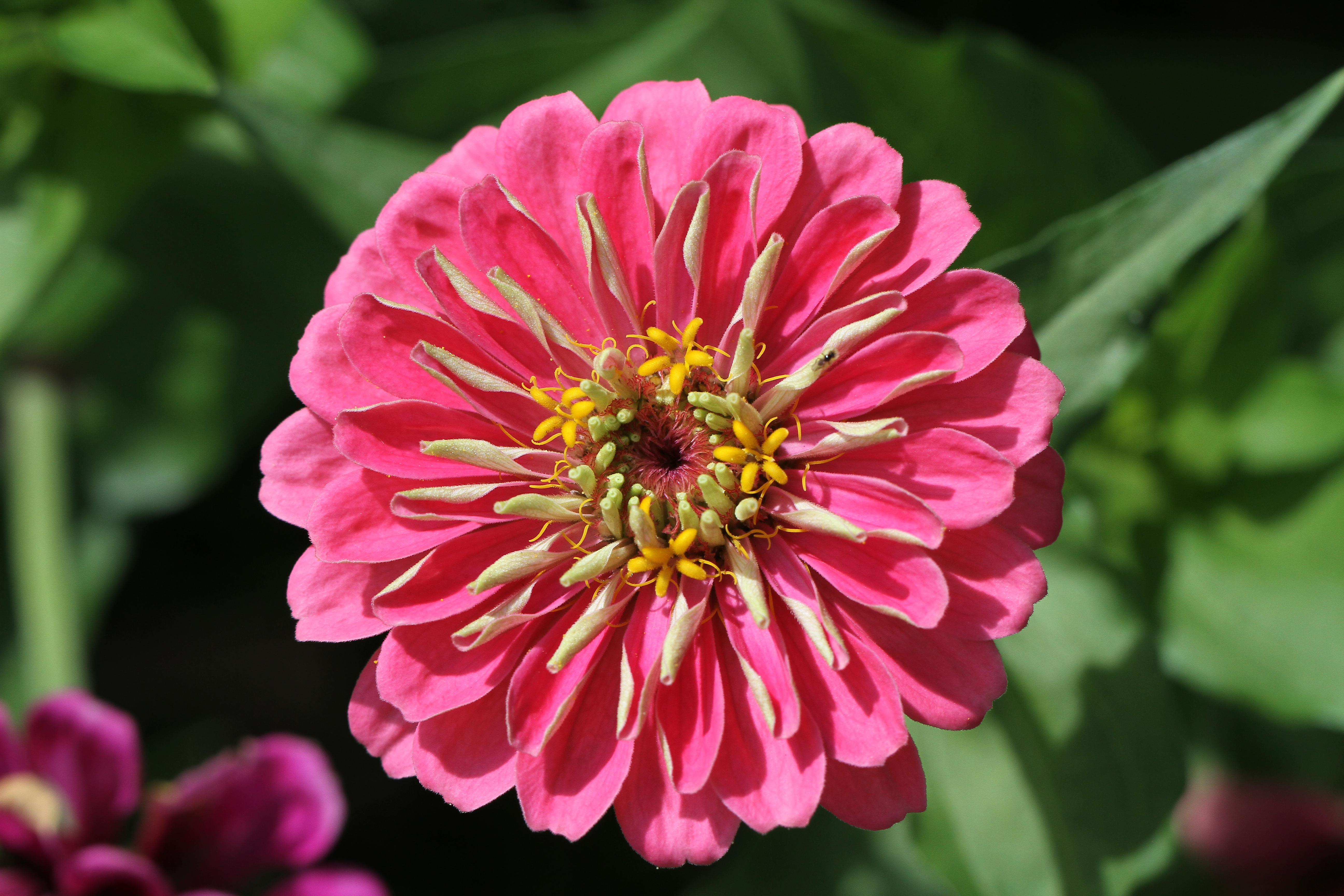 زهرة نبات الزينا الشعاعية وبداخلها الزهرة القرصية, والزهرة كاملة في مرحلة النمو التام وردية اللونZinnia elegans